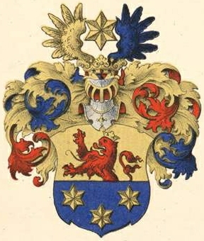 Sassi suguvõsa aadli- ja parunivapp